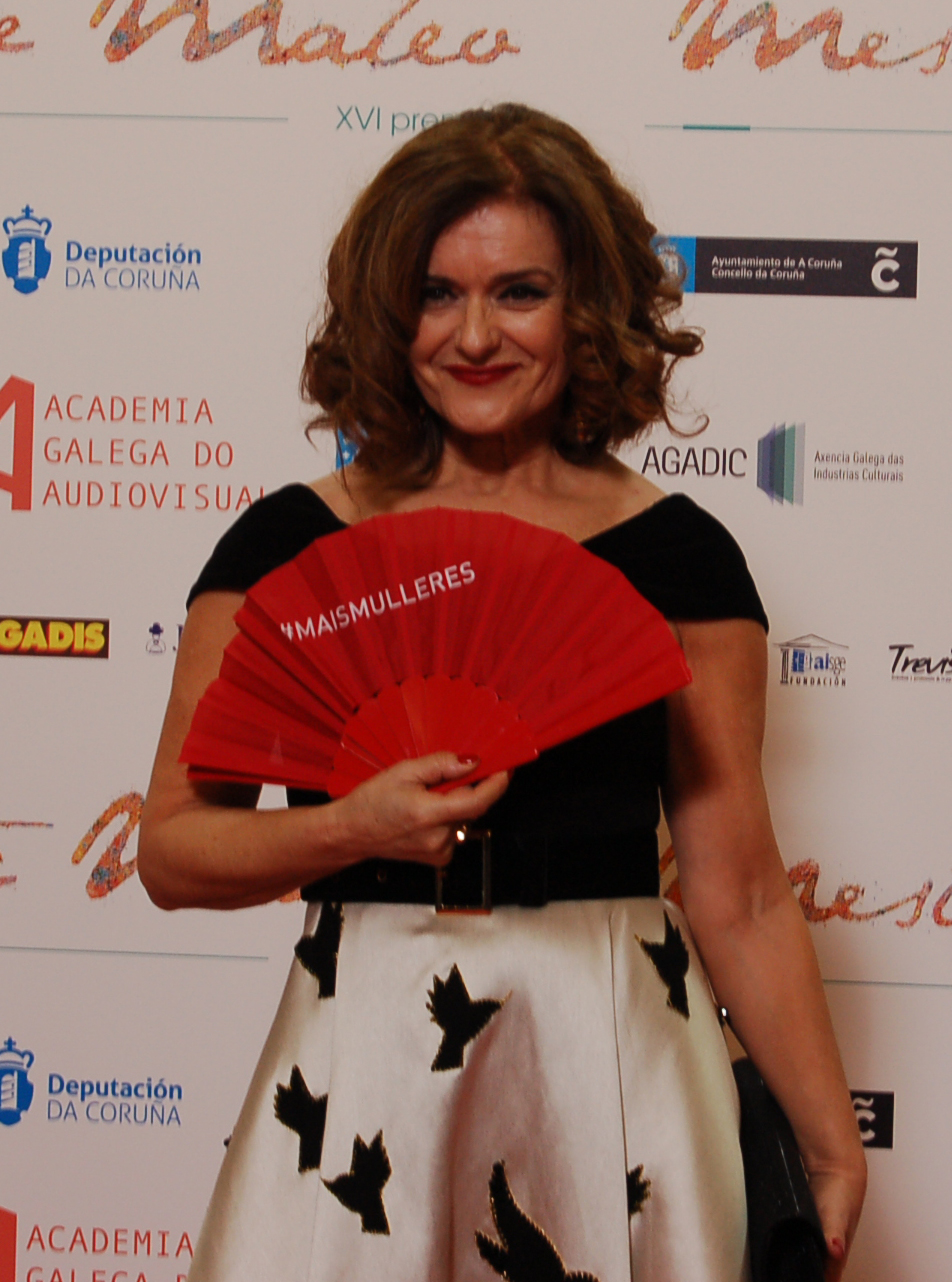 María Costas nos Premios Mestre Mateo 2017